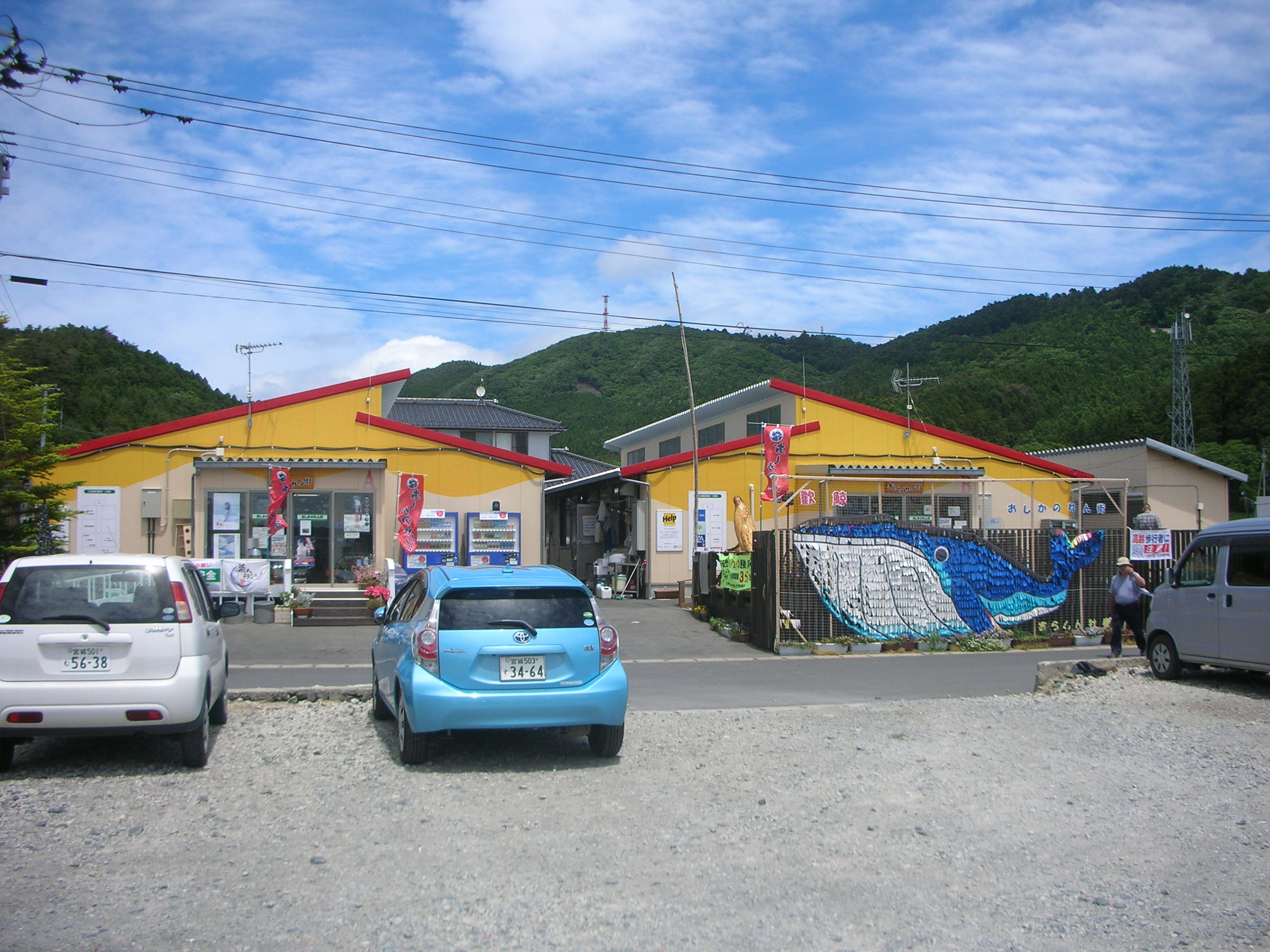 おしかのれん街